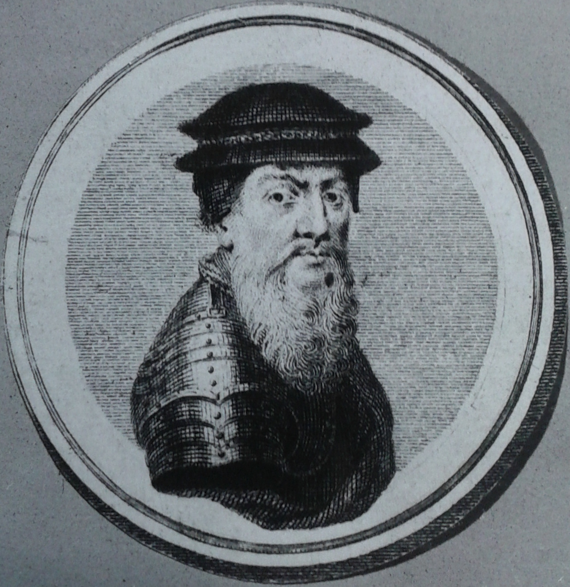 Jan Ligber „Portret Jana Tarnowskiego” miedzioryt wykonany przed rokiem 1814, na podstawie miniatury Walerii Tarnowskiej, która była wykonana na podstawie Portretu Jana Amora Tarnowskiego przez Marcello Bacciarellego z Zamku Królewskiego w Warszawie lub podobnego portretu z Dzikowa, które z kolei Bacciarelli malował na podstawie dawniejszego rysunku że zbiorów w Dzikowie na Polecenie Stanisława Augusta. (Zwraca uwagę, ze na jednym portrecie hetman trzyma rękę na hełmie, na drugim na buławie, a Waleria pominęła ułożenie rąk).